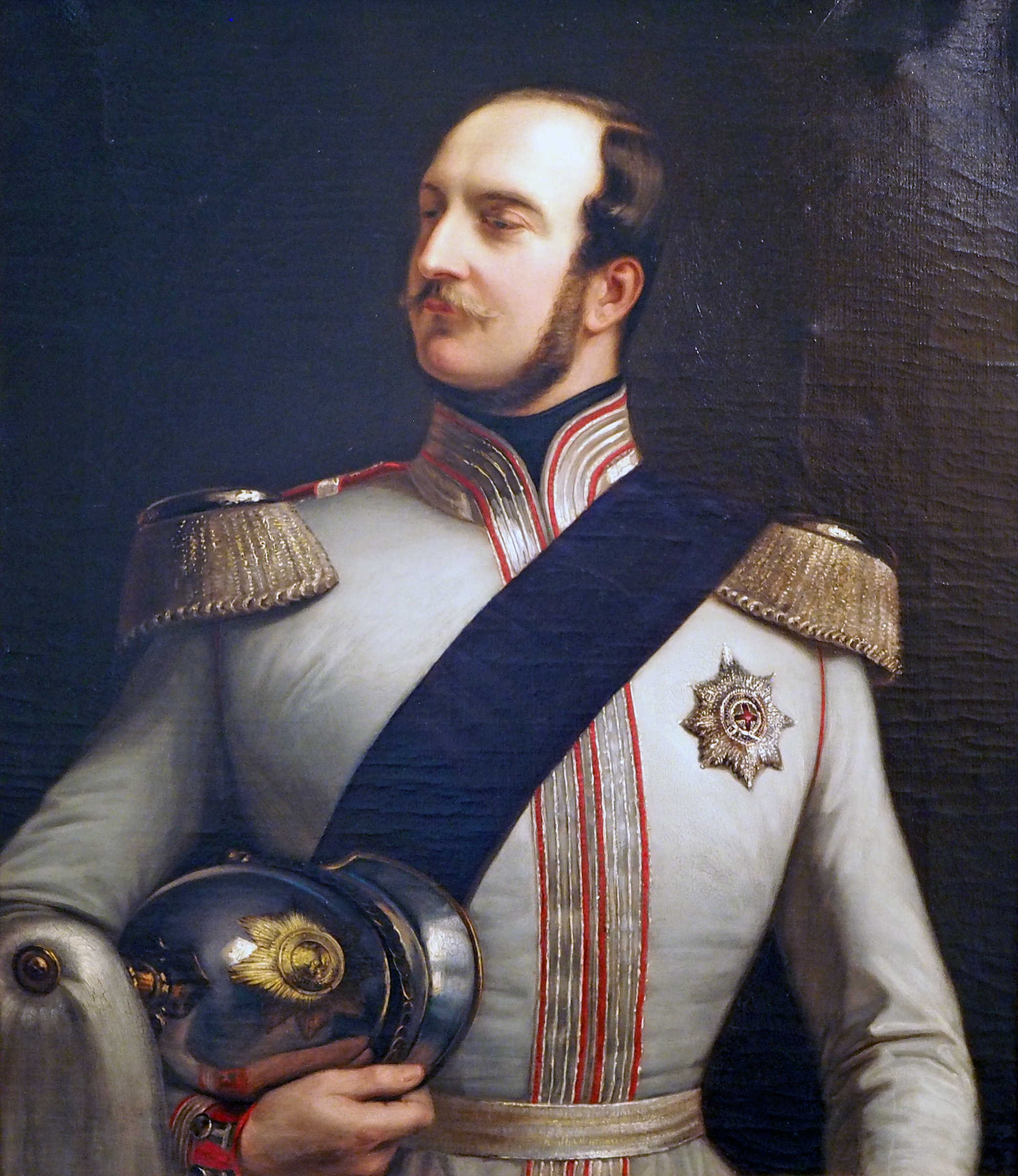 Georg V. (1819-1878), König von Hannover